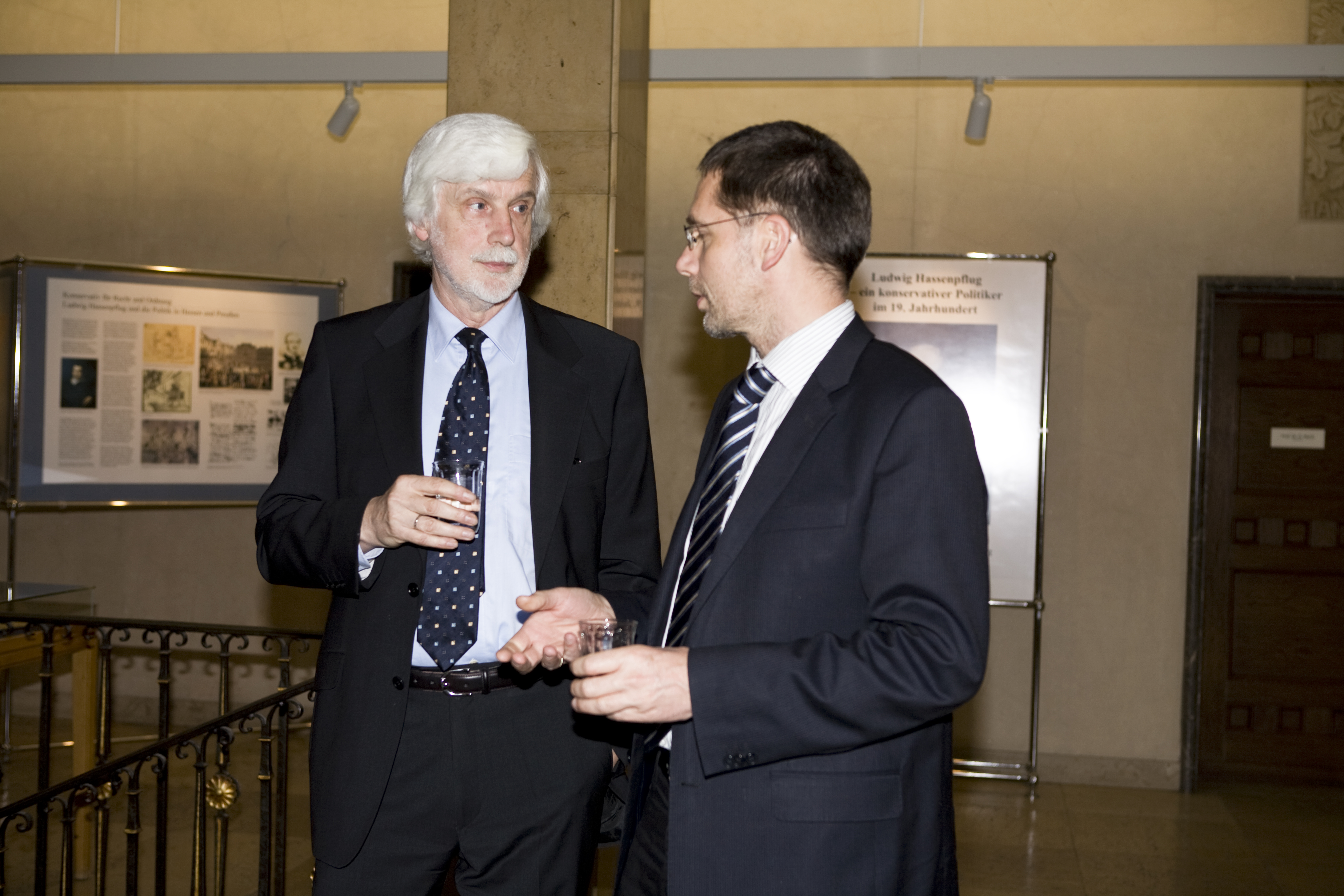 Volker Ullrich